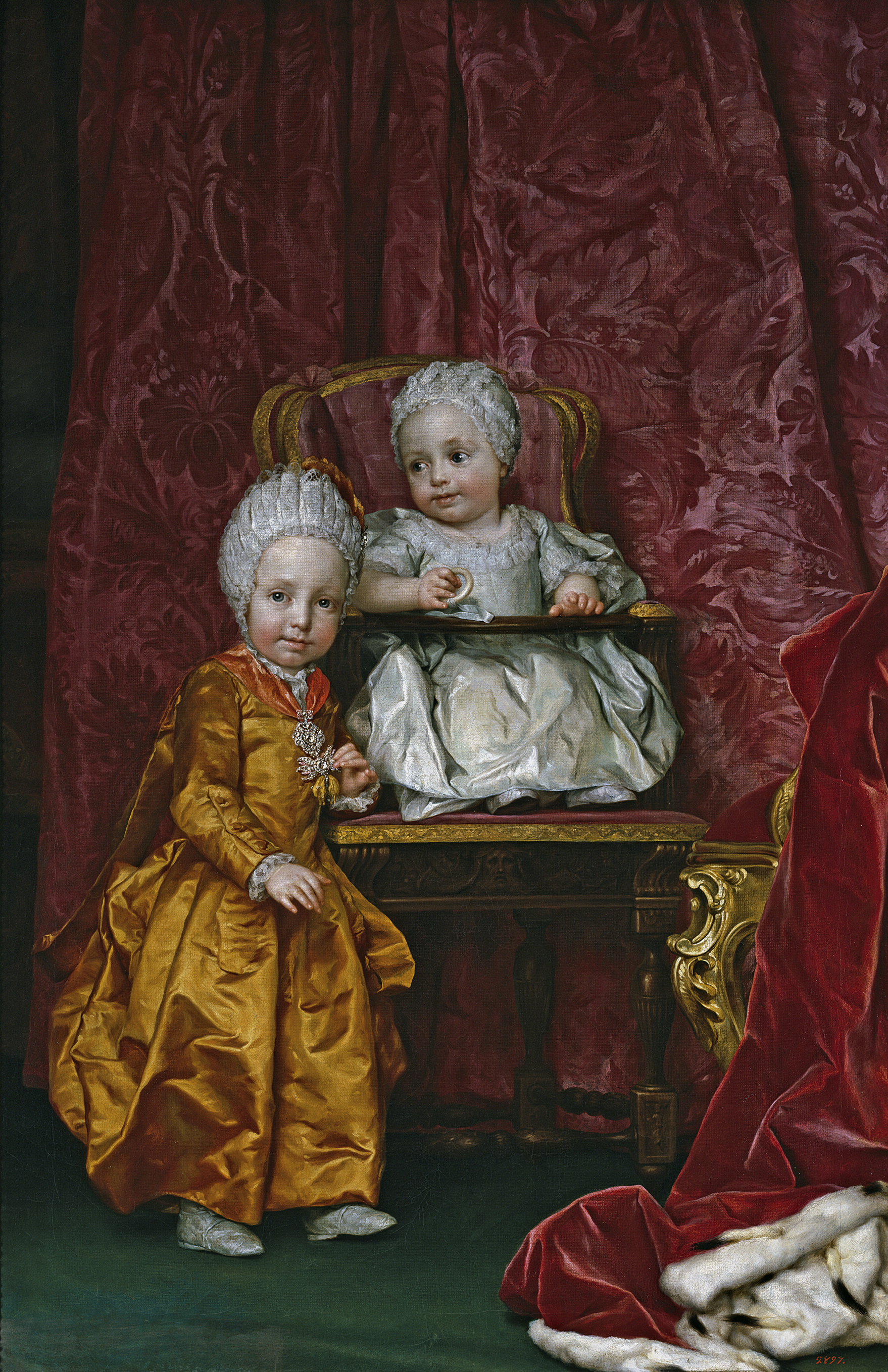 Retrato de los archiduques Fernando III de Toscana (1769-1824) y María Ana Fernanda de Austria (1770-1809), que fueron hijos del emperador Leopoldo II del Sacro Imperio Romano Germánico y de la emperatriz María Luisa de Borbón.